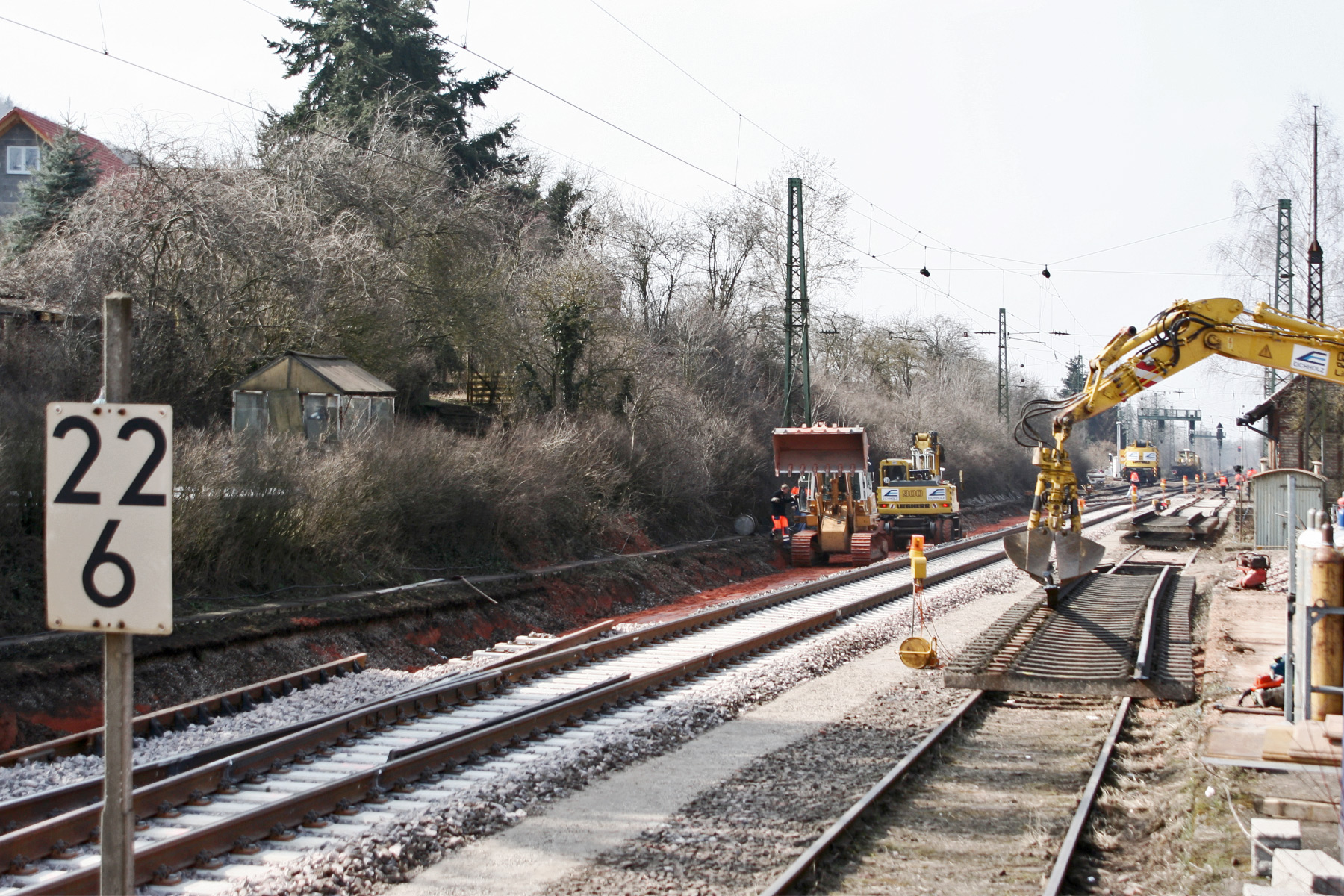 Track construction work on the Pfälzischen Ludwigsbahn in Hauptstuhl.